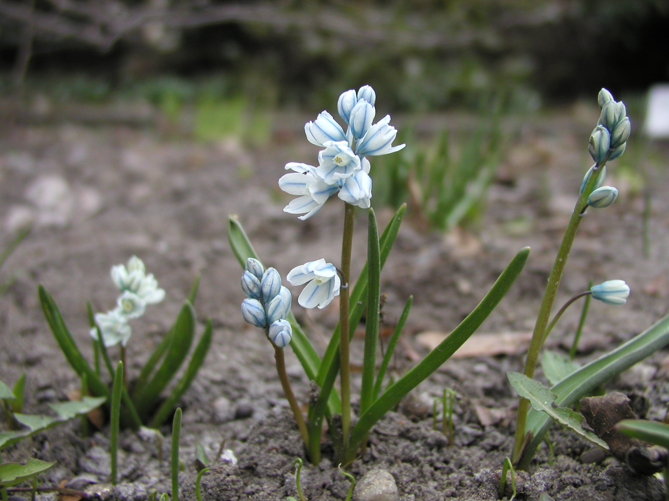 Puszkinia cebulicowata Puschkinia libanotica